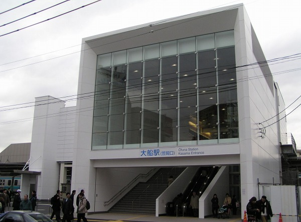 大船駅, Ofuna station